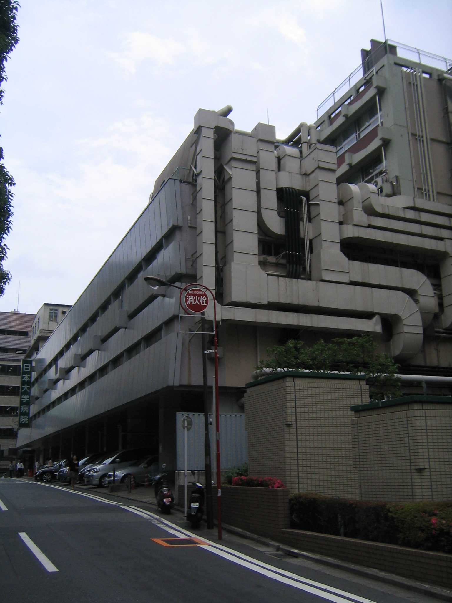 日本大学駿河台病院